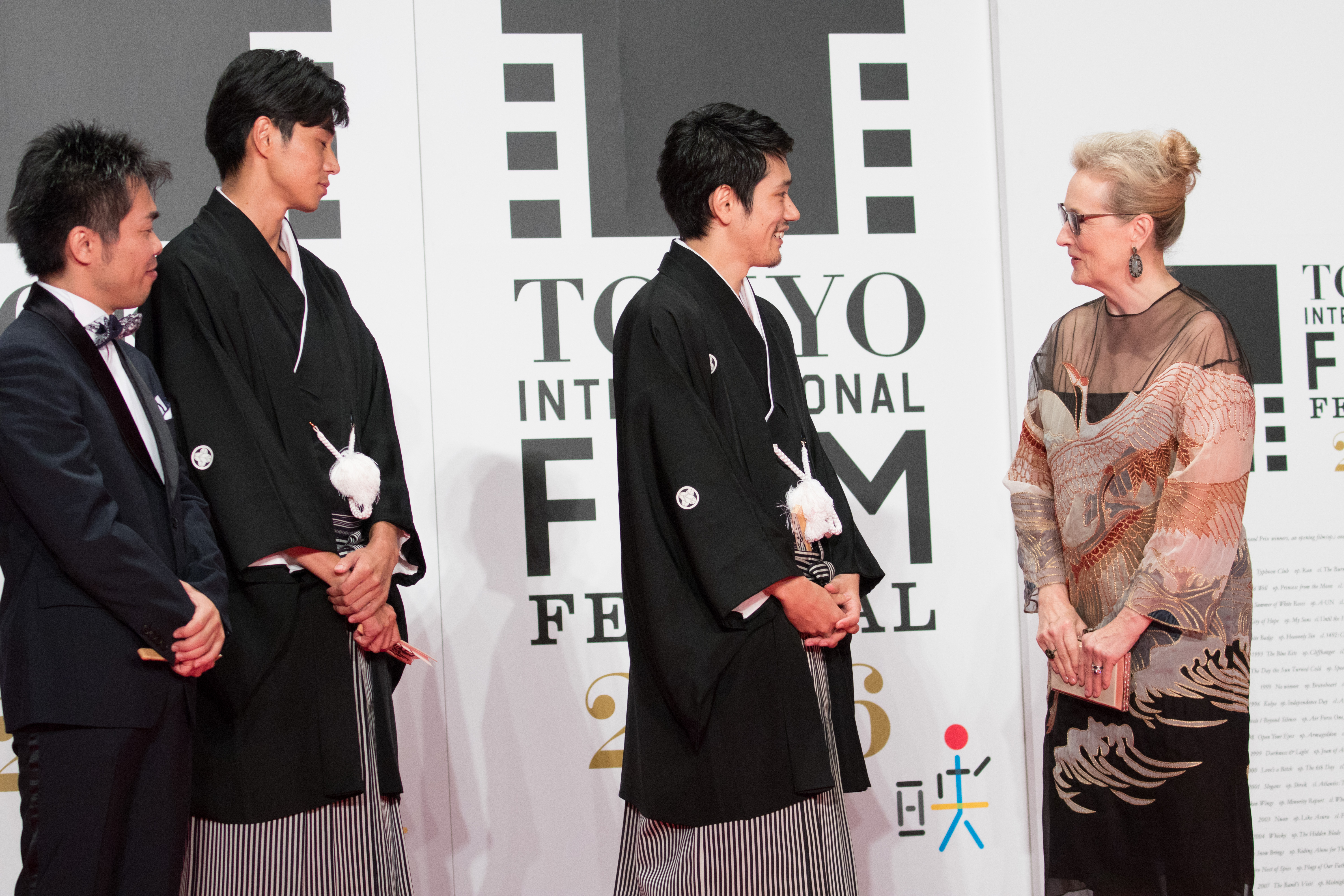 第29回 東京国際映画祭 オープニングセレモニー 松山ケンイチ 東出昌大 森義隆 メリル・ストリープ